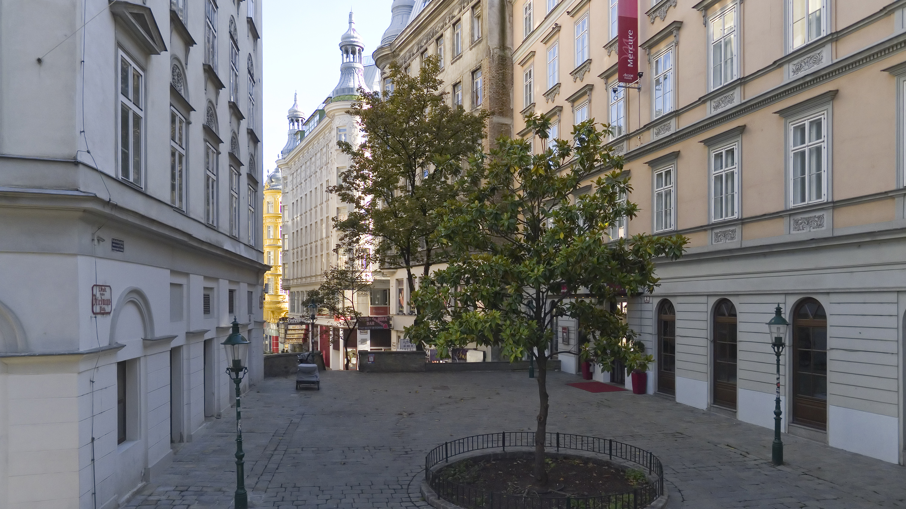 Desider-Friedmann-Platz in Wien 1 bei der Judengasse Richtung Südosten